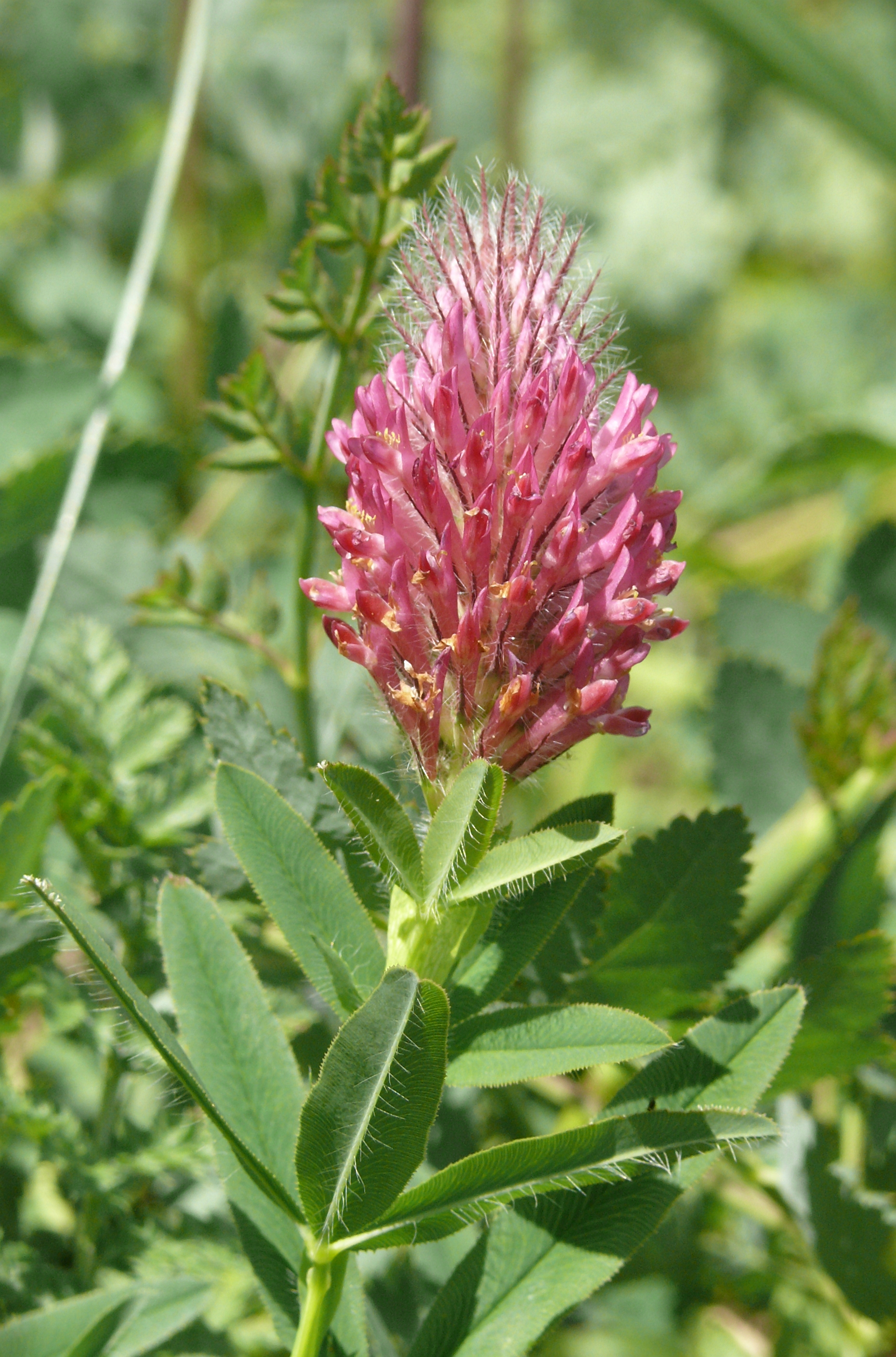 Trifolium rubens, Tauberland, Deutschland